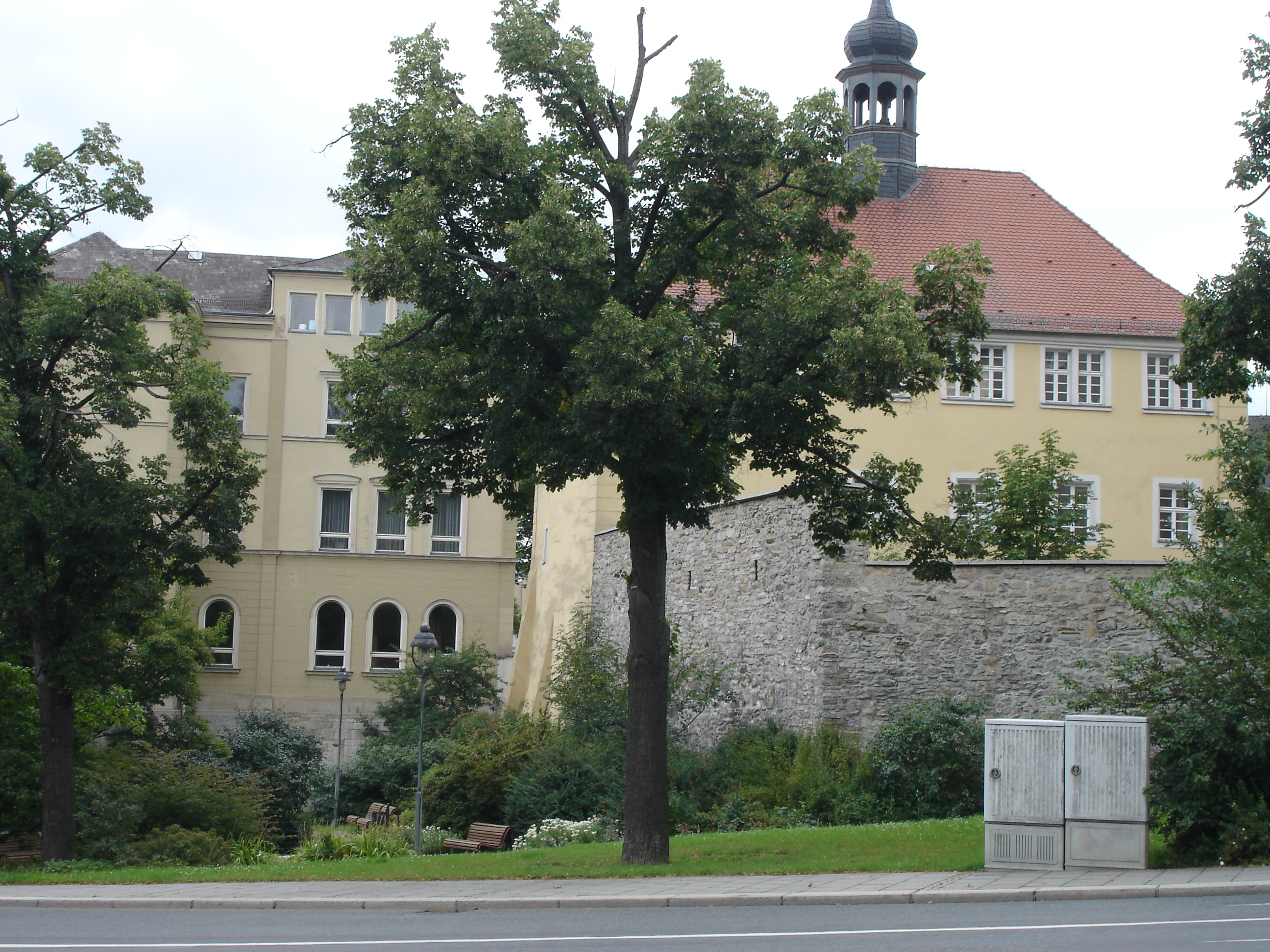 Franziskanerkloster Hof